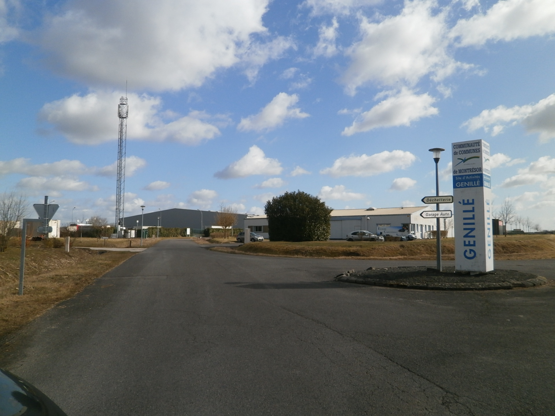 Zone industrielle de la Vènerie